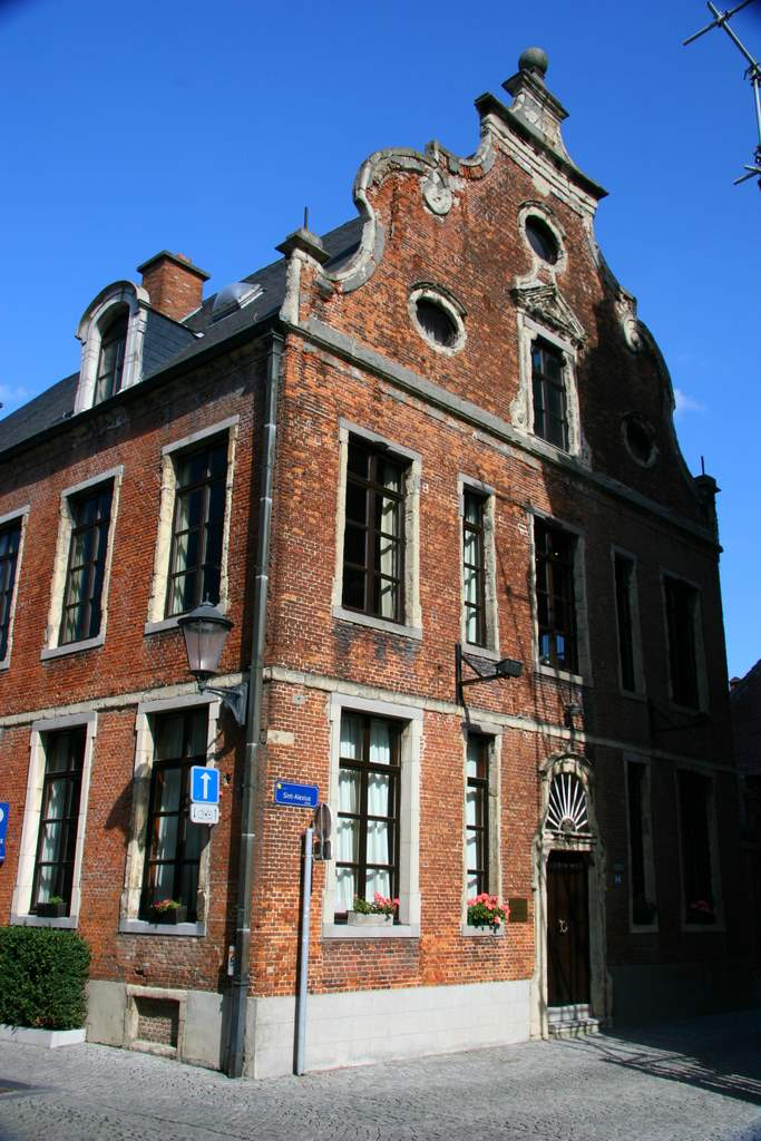 A mecheleni nagy beginaudvar egyik háza, Belgium